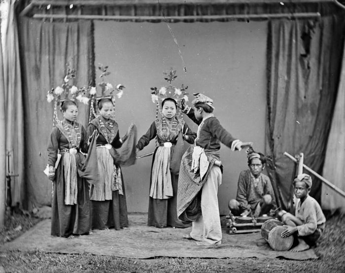 Negatief. Danseressen en muzikanten te Gorontalo, Noord-Celebes